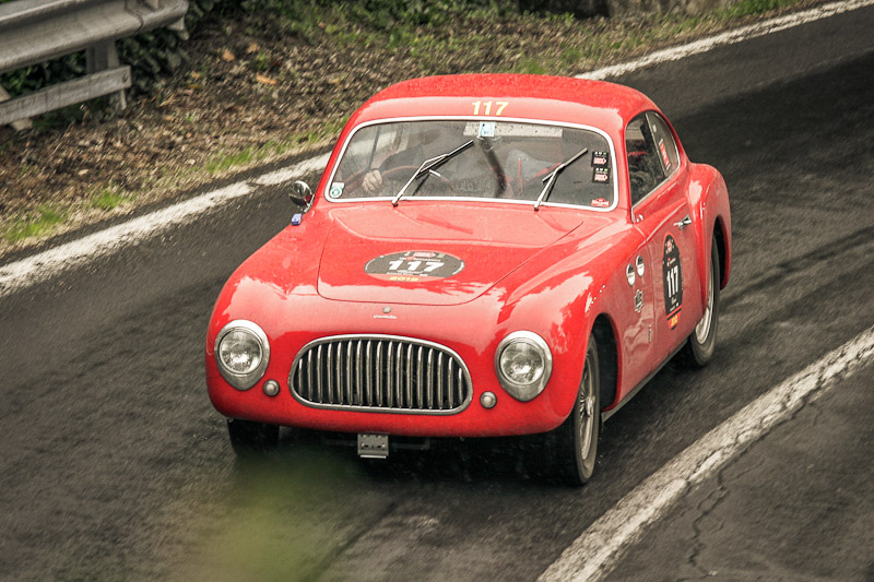 1000 miglia 2012 - SS della Futa . Pianoro (BO)